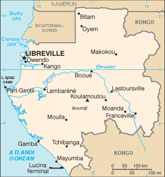 Gaboni kaart